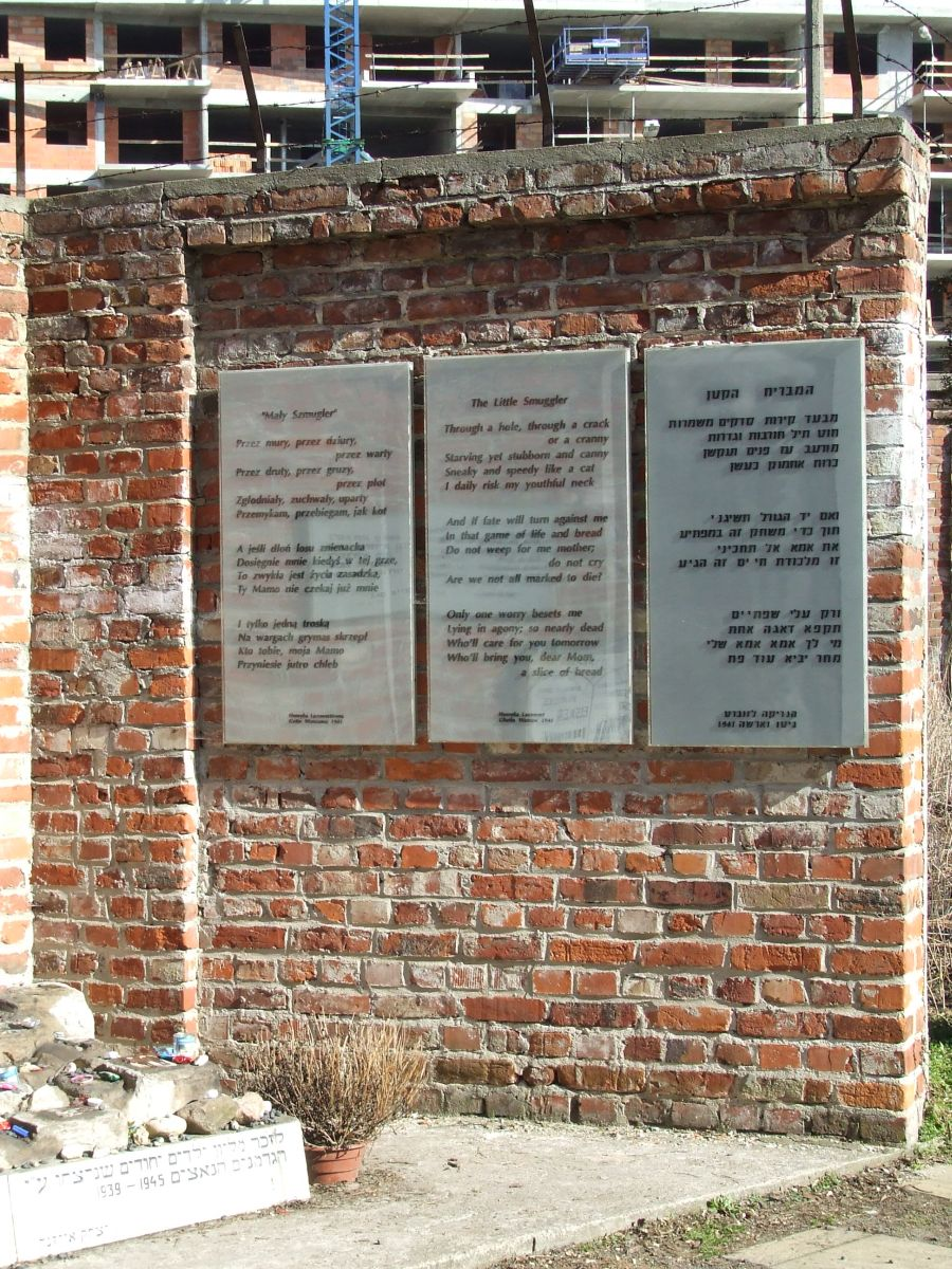 Zbliżenie na wiersz